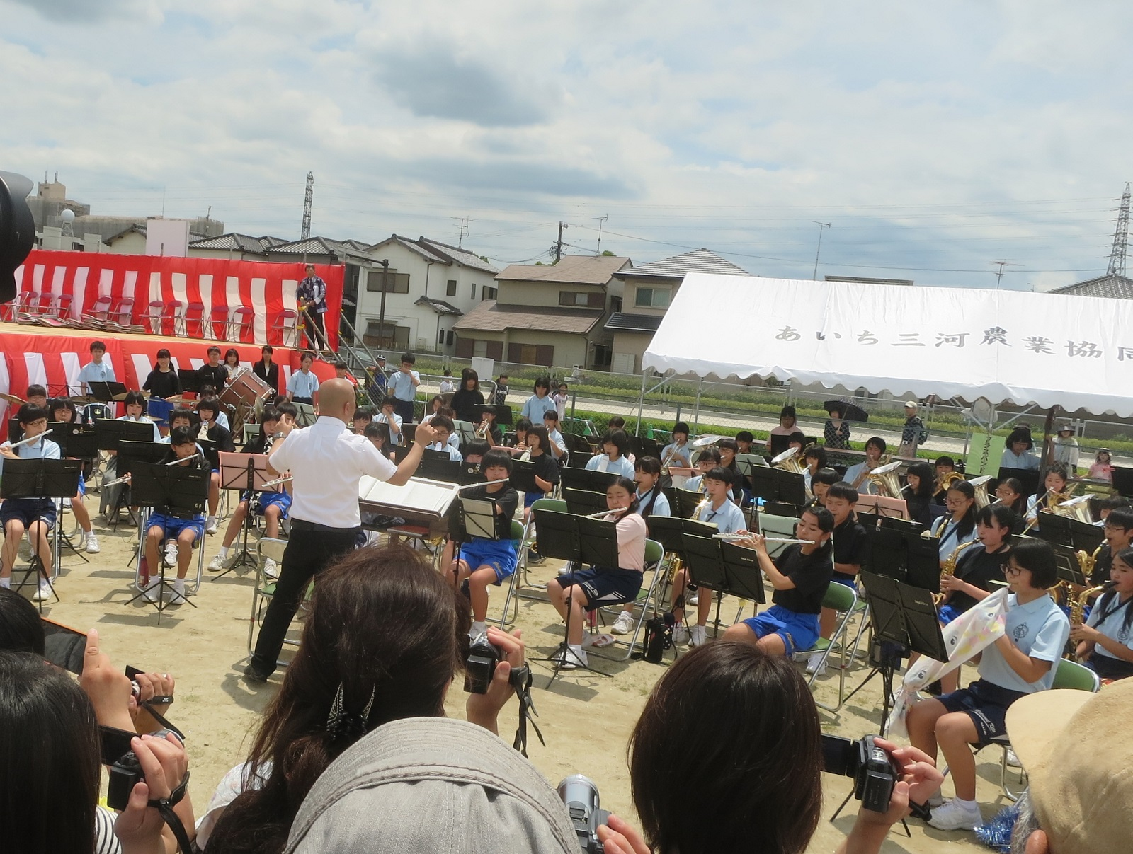 六ツ美悠紀斎田お田植えまつり（岡崎市中島町）